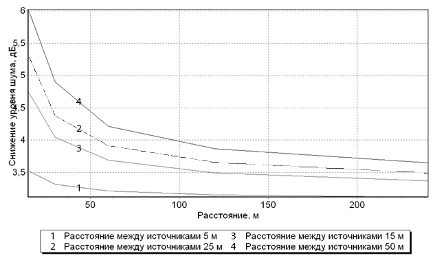 dsf